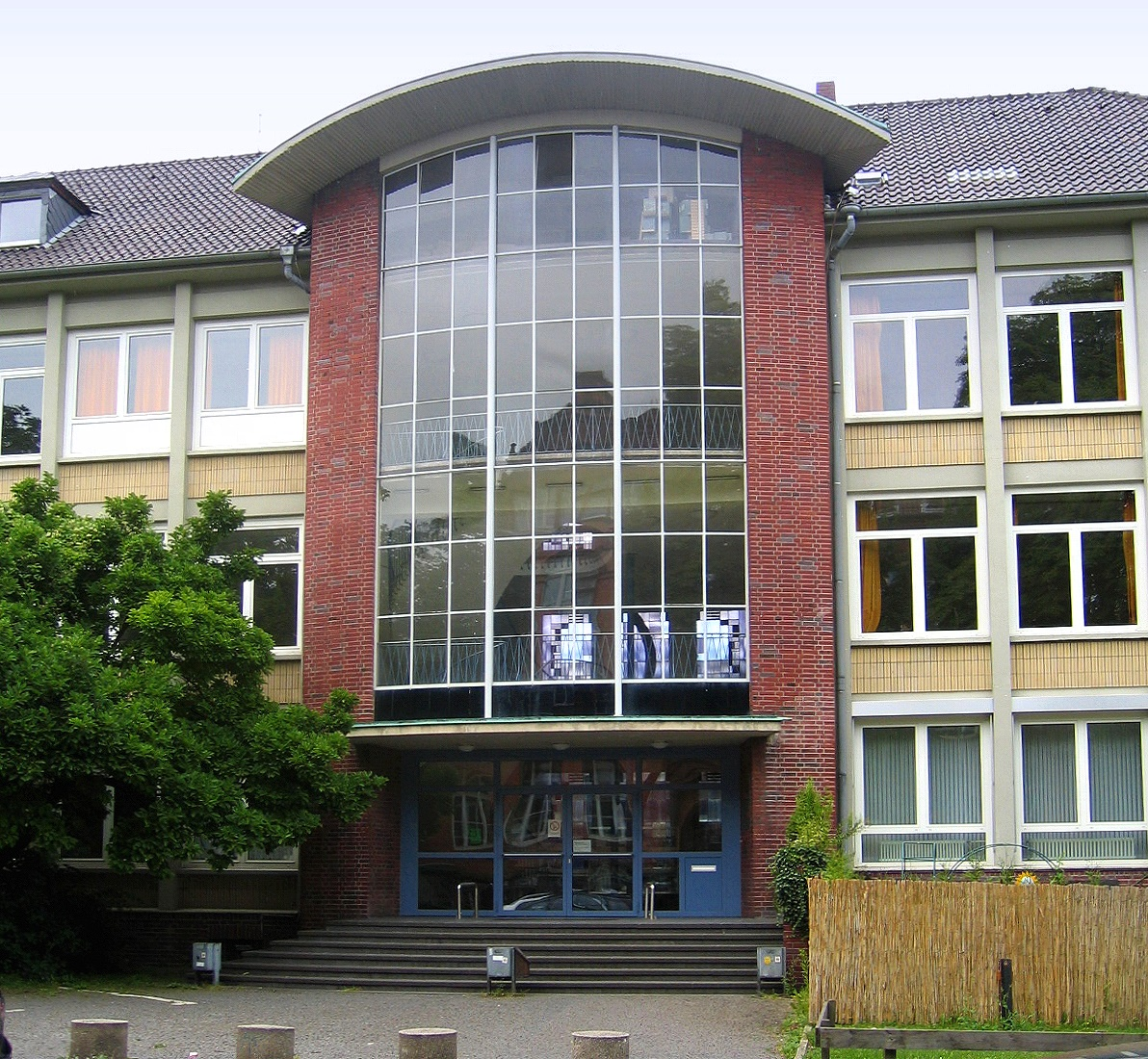 Eingangsbereich Theodor-Reuter-Berufskolleg in Iserlohn, Karnacksweg 43